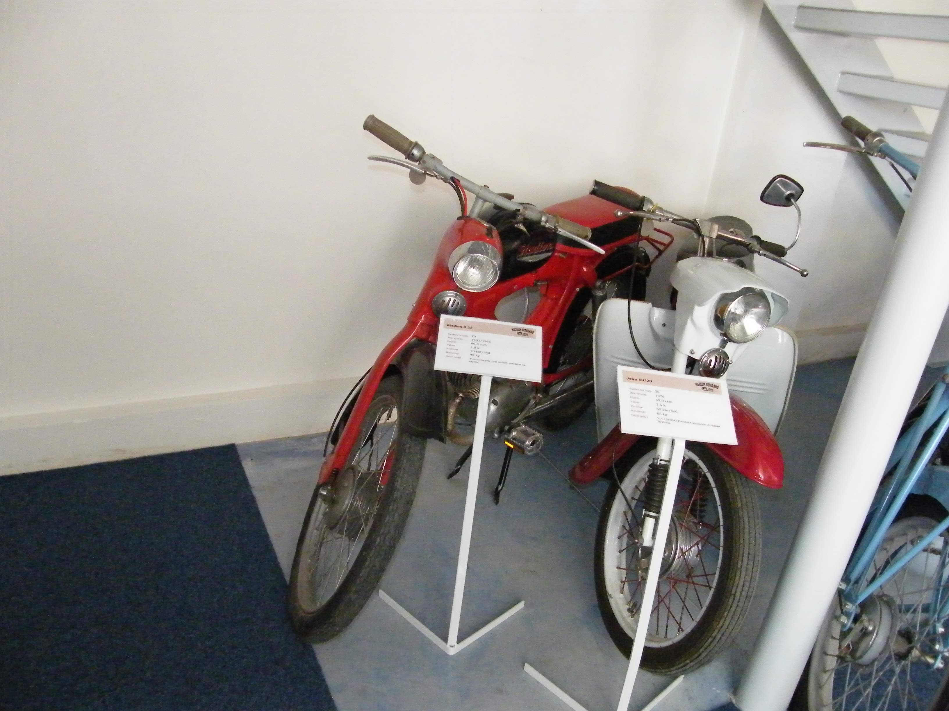 Jawa 50/20 (vpravo) a Stadion S23 (vlevo)